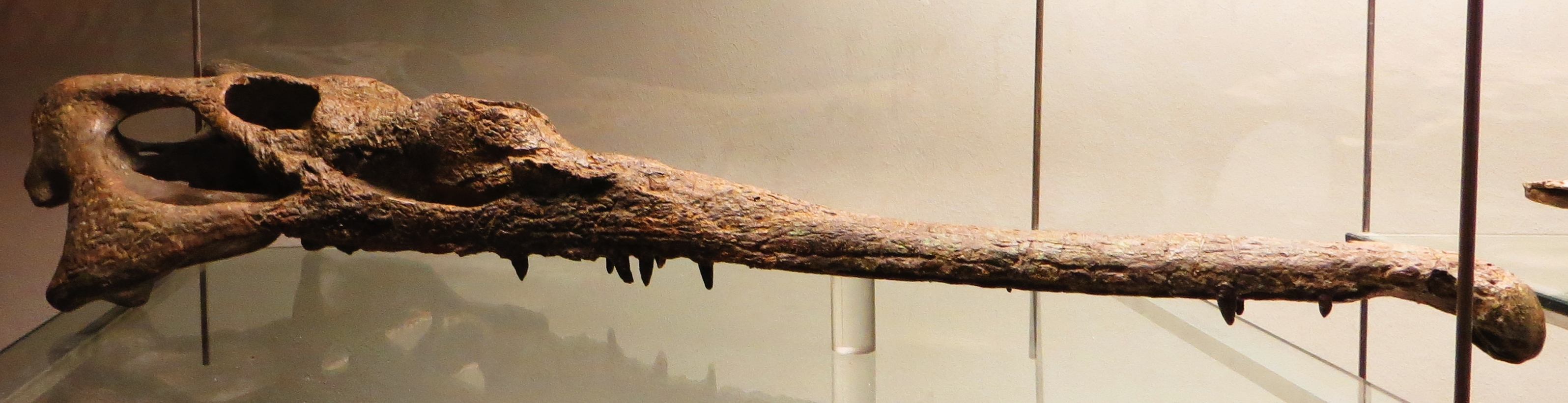 Fossil of Mystriosuchus, an extinct reptile - Took the picture at Museum of Paleontology, Tuebingen